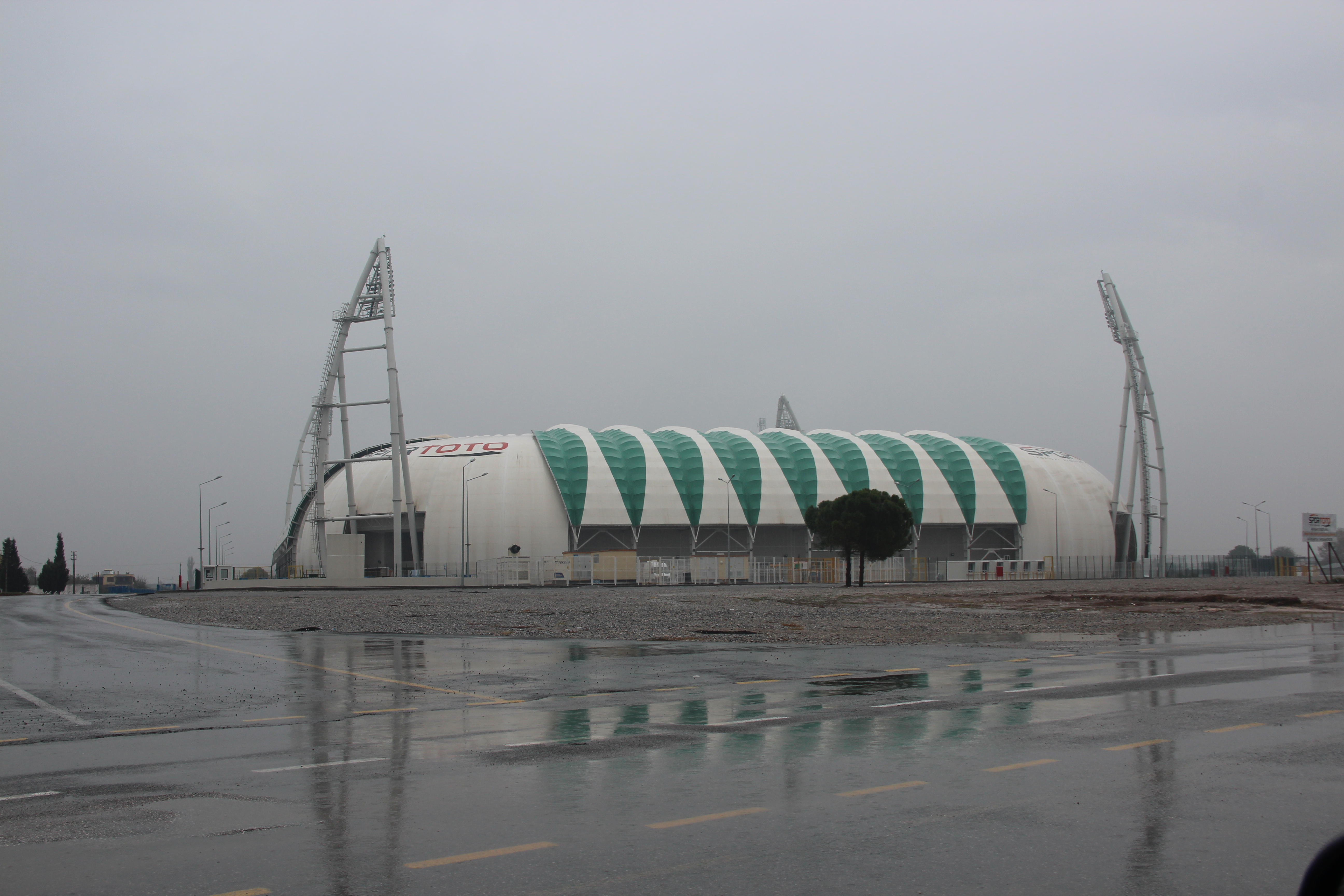 Spor Toto Akhisar Stadyumu 20181118